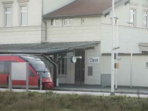 Bahnhof Kleve, Niederrhein, Germany, 2006